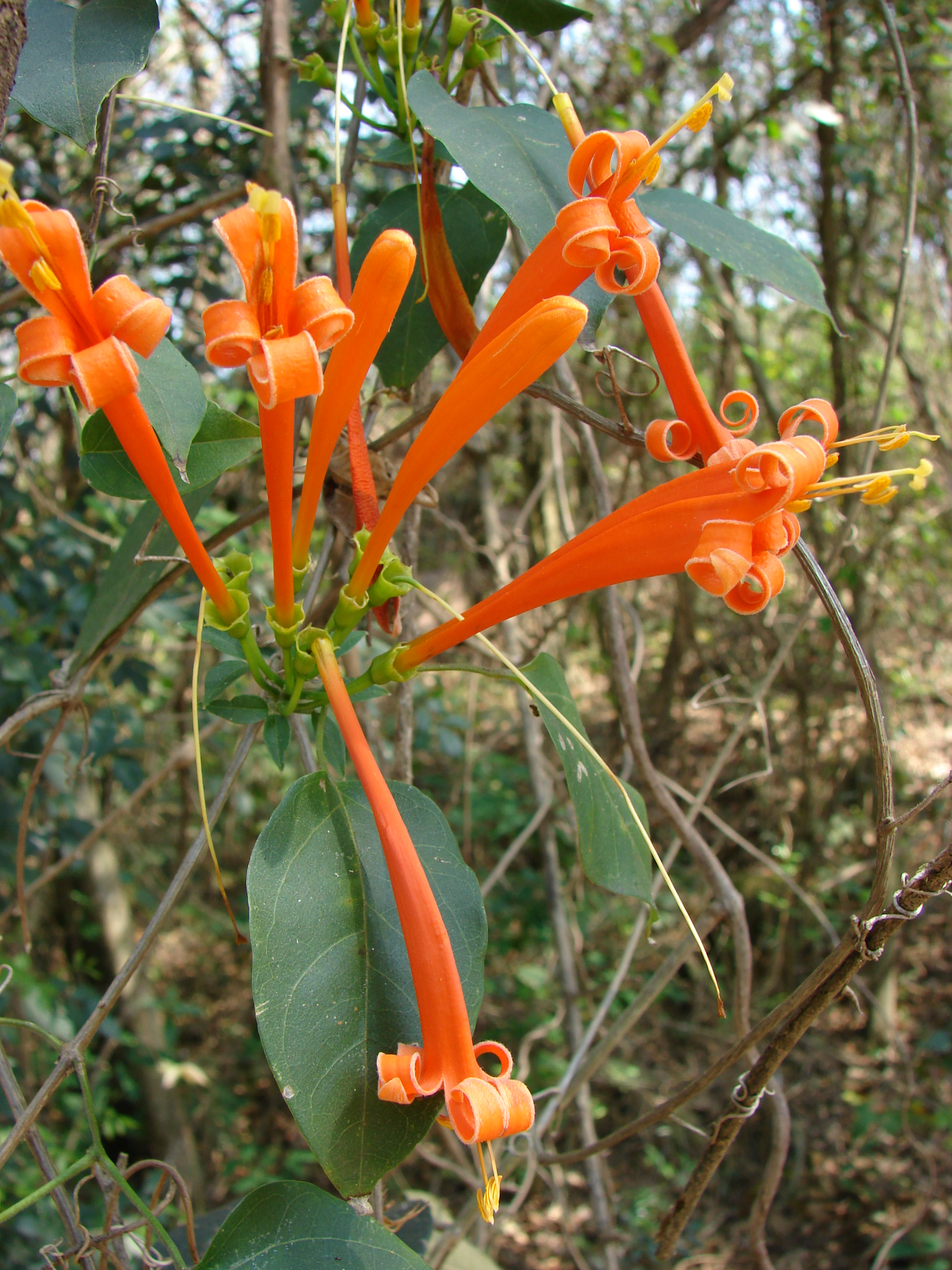 Pyrostegia venusta's flower. (Flor-de-São-João in Brazil)